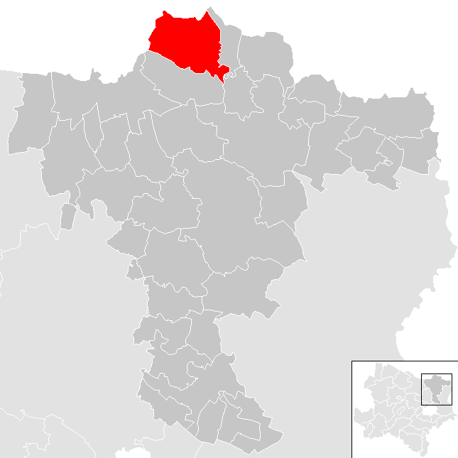 Bezirk Mistelbach